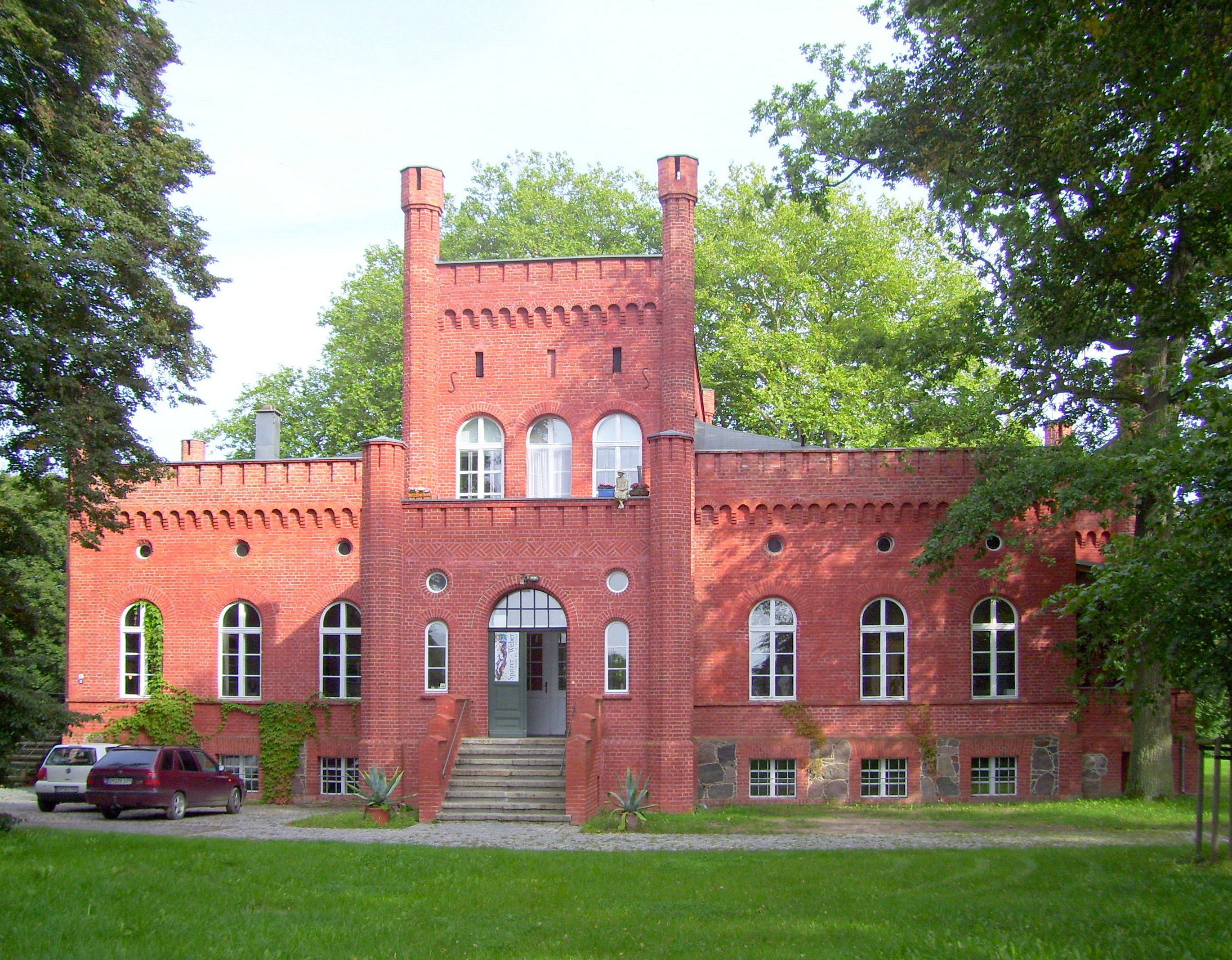 Herrenhaus Libnow, Westseite mit Eingangsportal